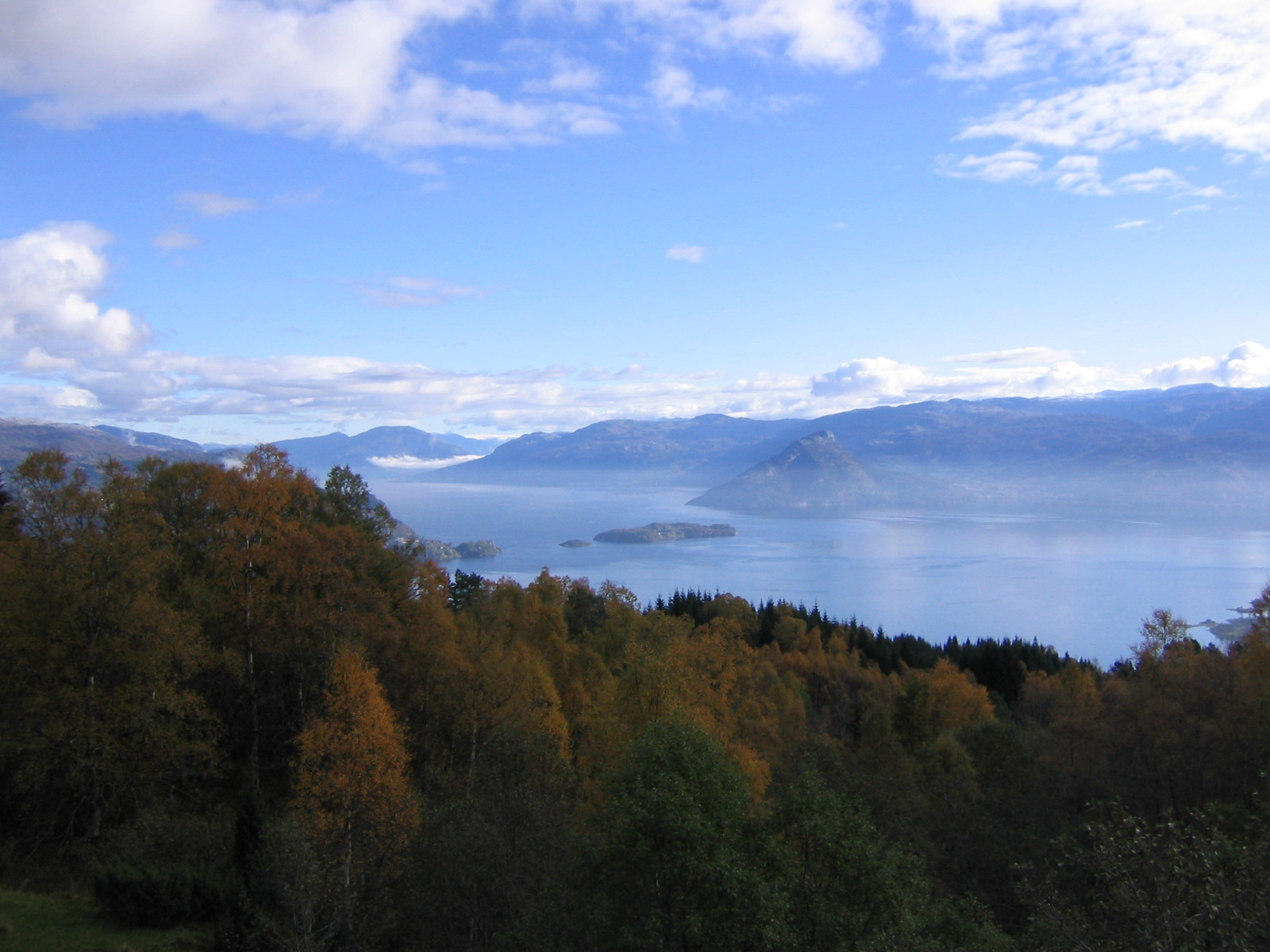 A view of the Hardangerfjorden from Krokavatn, near Norheimsund.